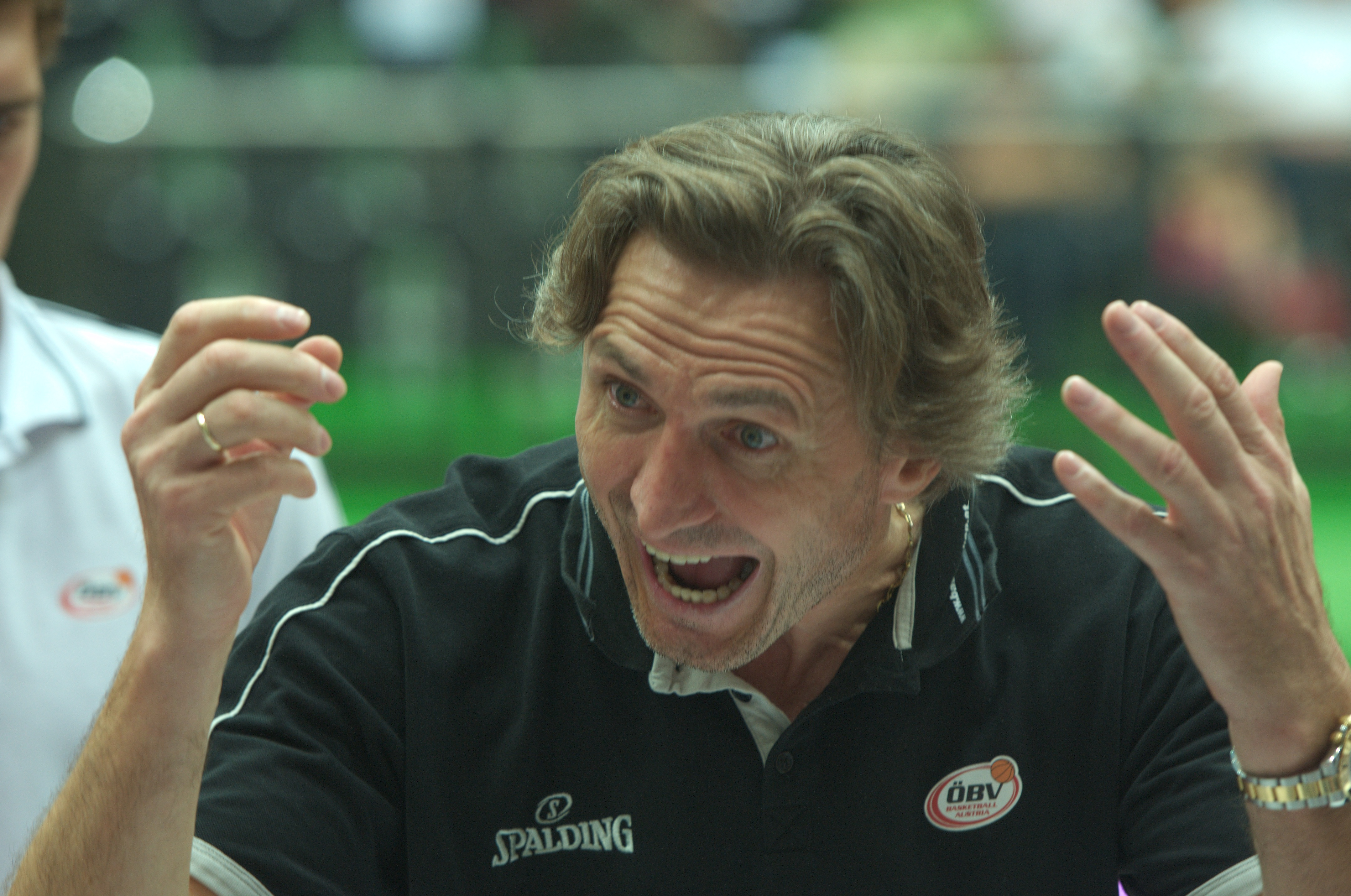 Neno Ašćerić, Coach der österreichischen Basketball-Nationalmannschaft